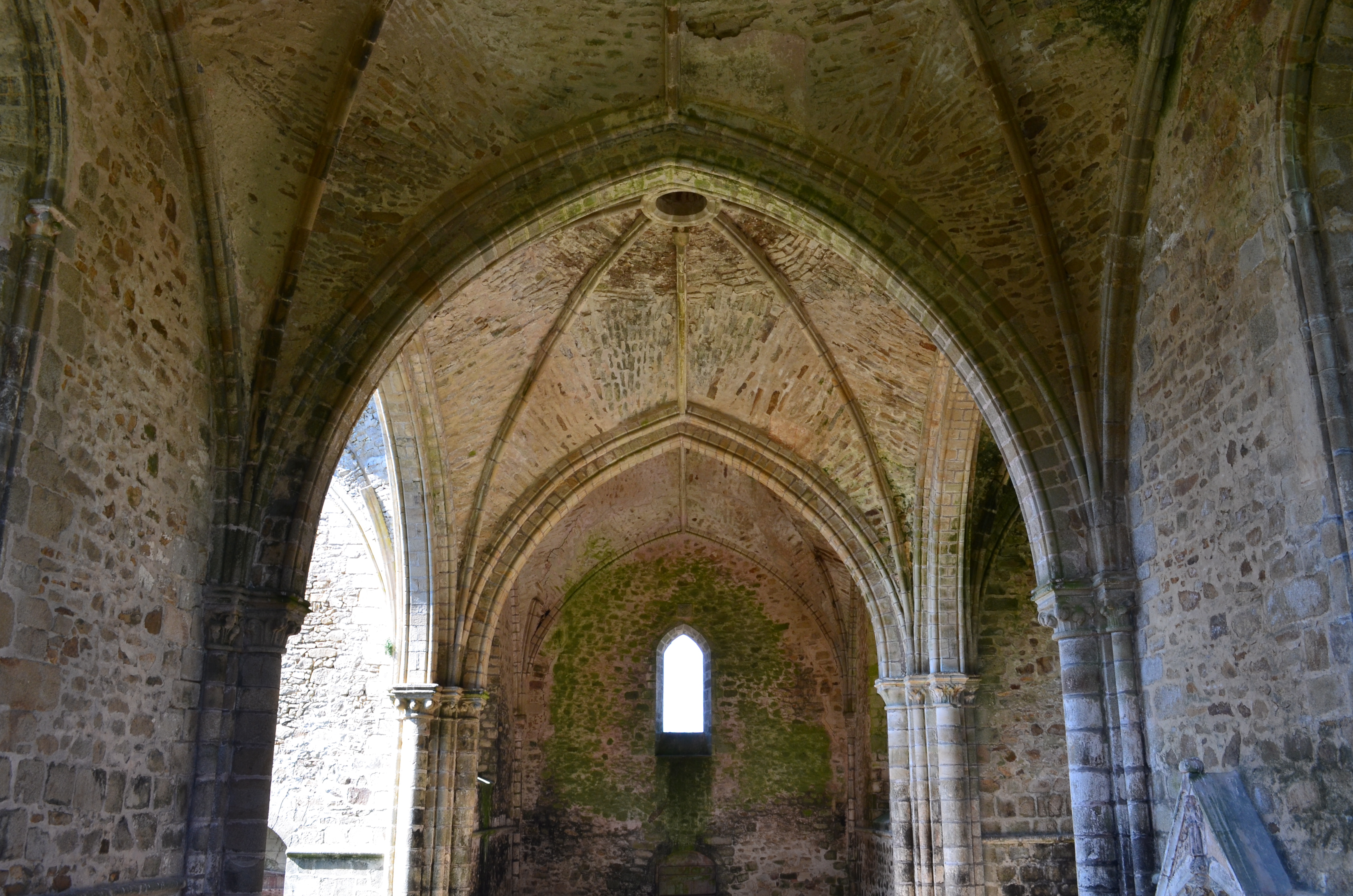 Ancienne abbaye des Fontenelles (13e s. ; 15e s.) - Saint André D'Ornay, La Roche-sur-Yon .